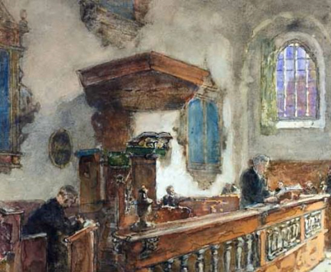 Voor de preek, uitsnede van een groter schilderij